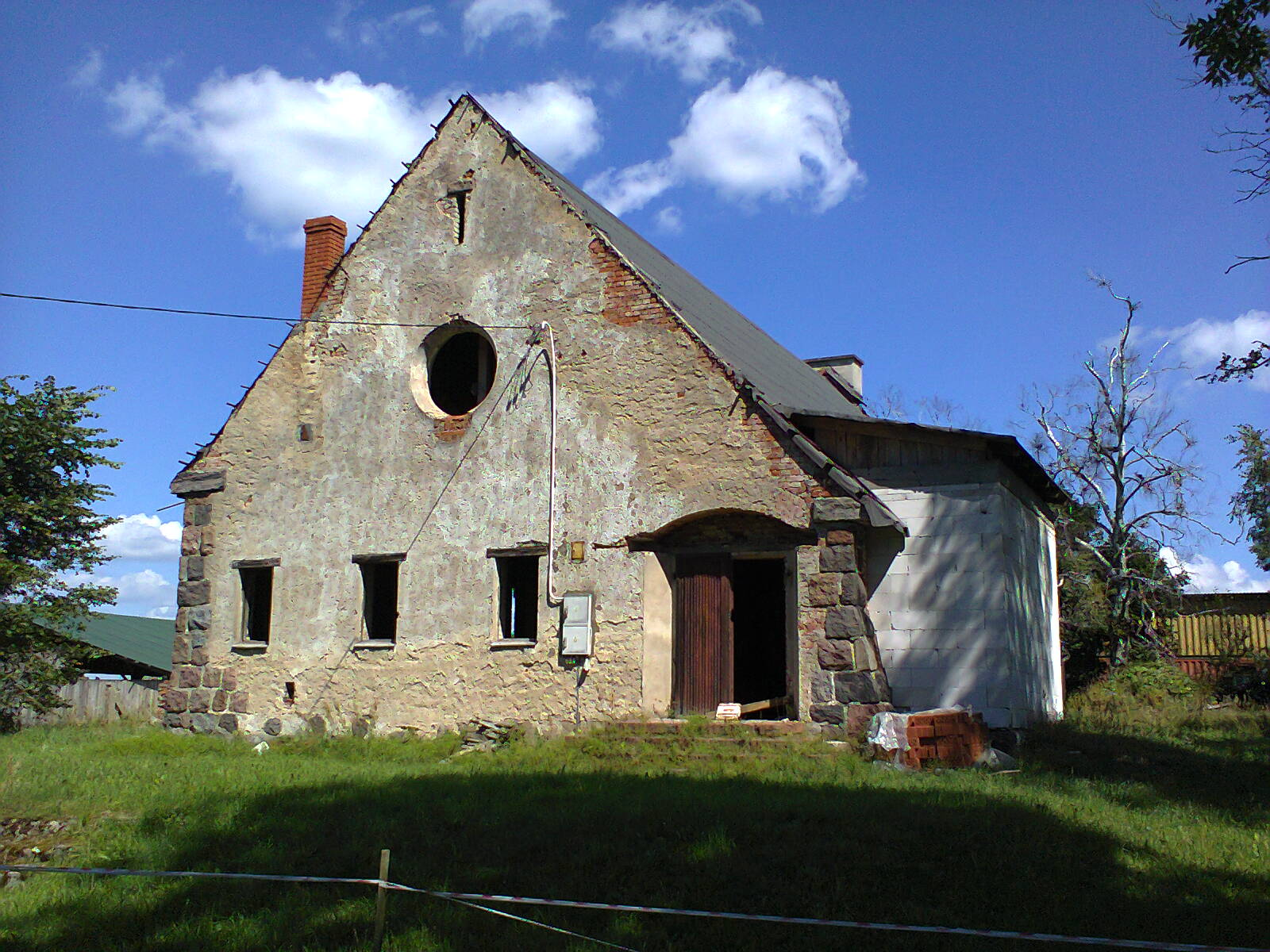 Klon - zniszczony kościół ewangelicki (powiat szczycieński)